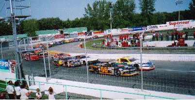 Départ de la première course de la Série nationale Castrol le 15 mai 2005 - Photo Paul-Émile Poulin-Jacques